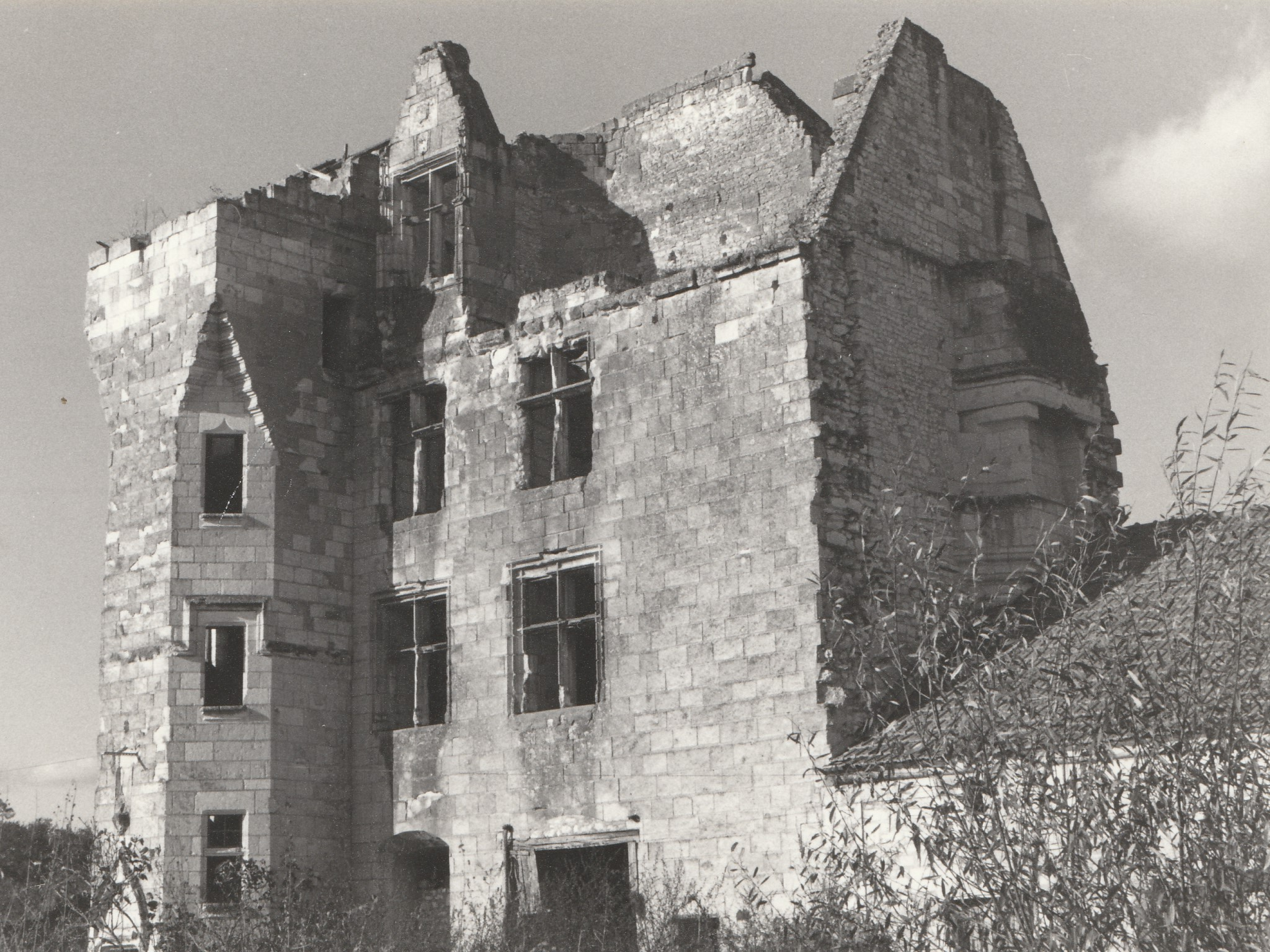 Cette photo prise en 1980 représente le château de Montpensier quand il était encore en ruine.